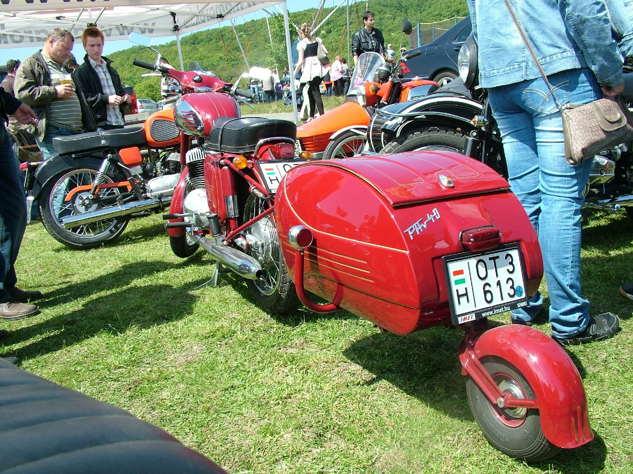 Traktormajális, Bokor 2011.05.07. 124